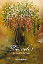 Tapa de DESVELOS